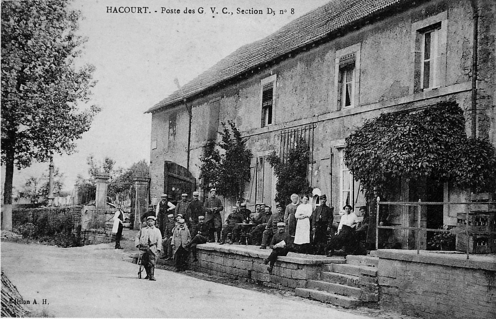 sur une carte du début du XXe siècle.